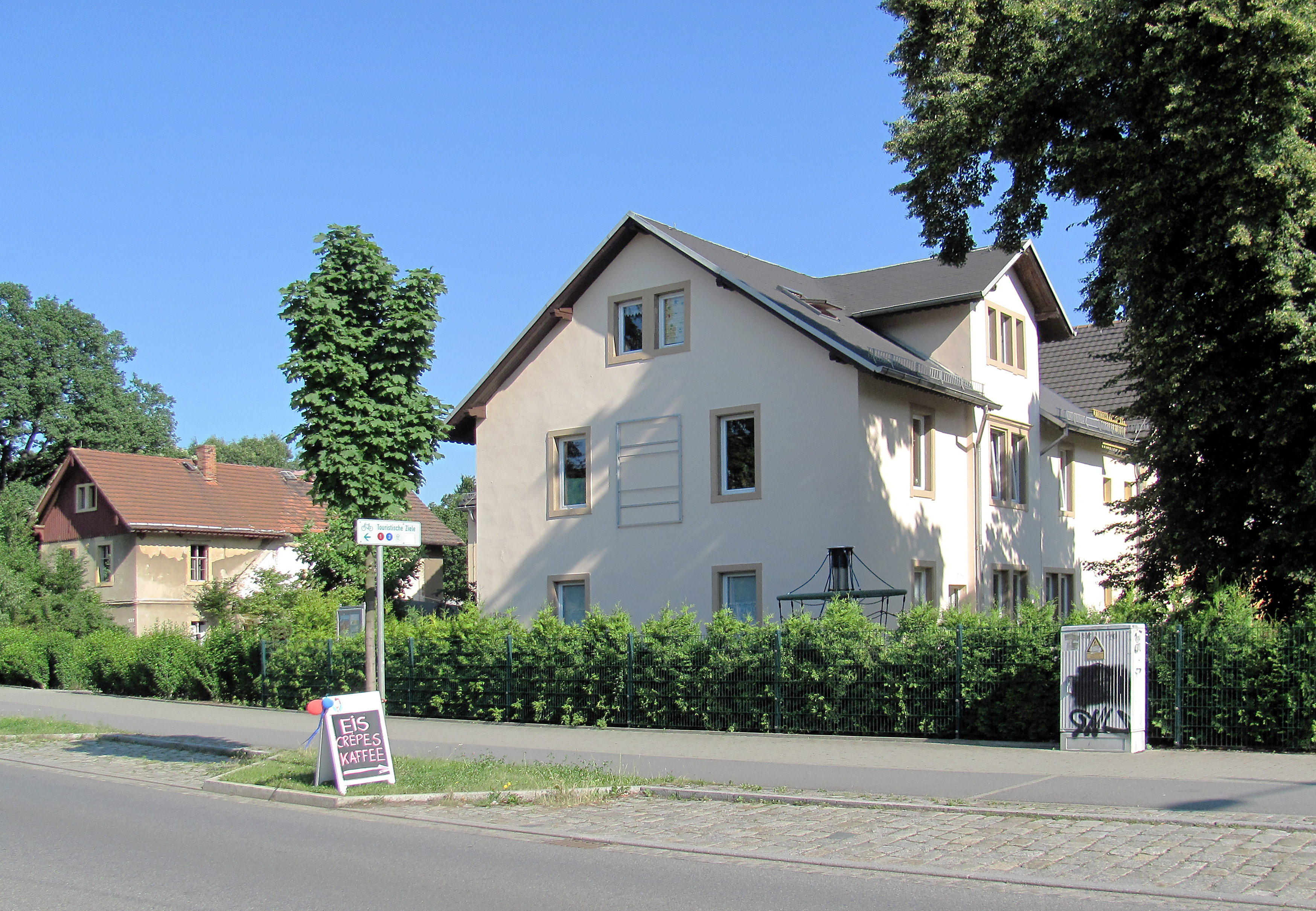 Radebeul-Serkowitz, ehem. Baubetrieb F. W. Eisold, Meißner Straße 139